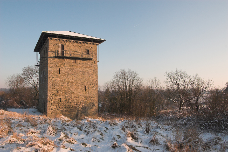 Donjon de Villeret, à Jemeppe-sur-Sambre (M) ainsi que l'ensemble formé par ce donjon et les terrains qui l'entoureent (S)